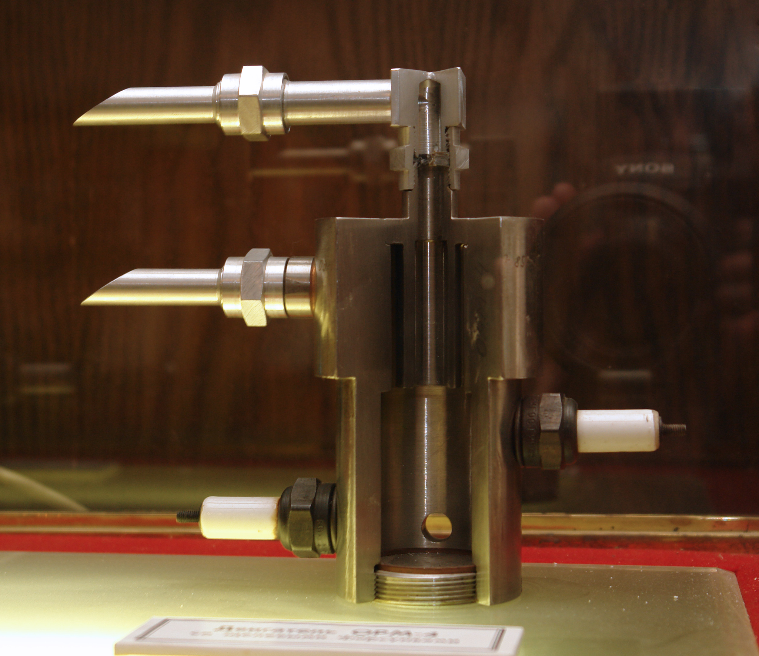 Экспериментальный жидкостный ракетный двигатель ОРМ-4. Музей космонавтики и ракетной техники; Санкт-Петербург. This photograph was taken in Museum of Space and Missile Technology (Saint Petersburg) Object location59° 57′ 07″ N, 30° 19′ 16″ E